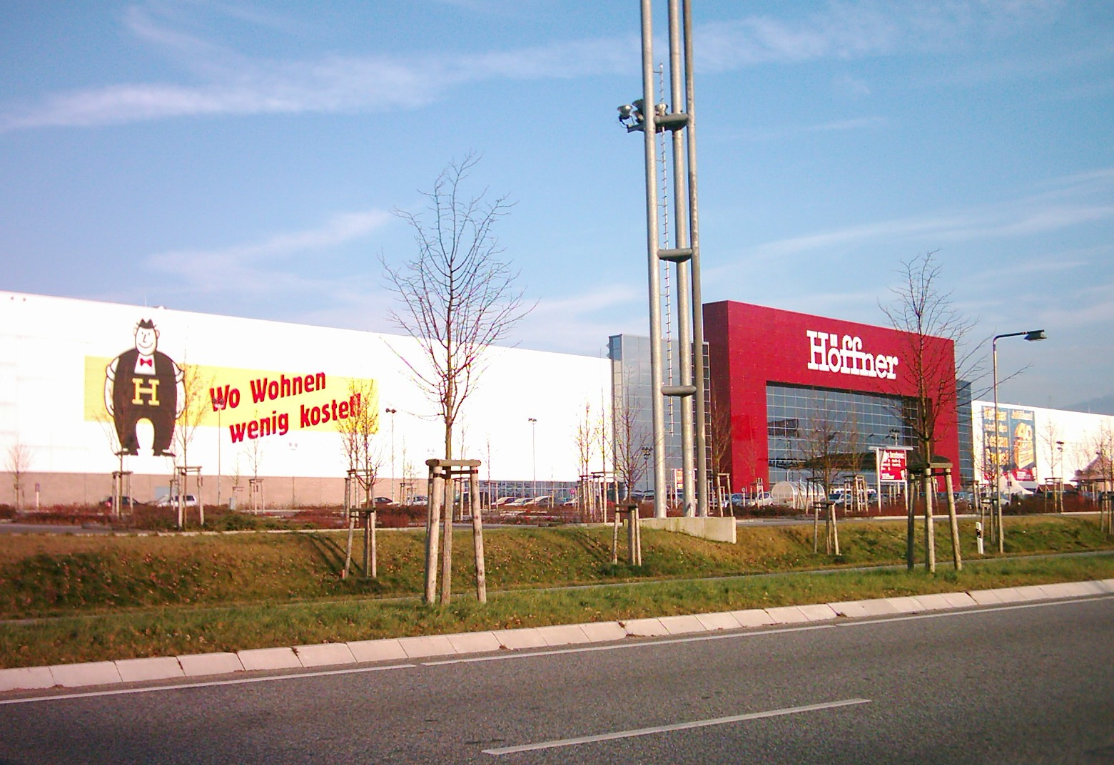 Höffner Möbelmarkt in Barsbüttel, Schleswig-Holstein.